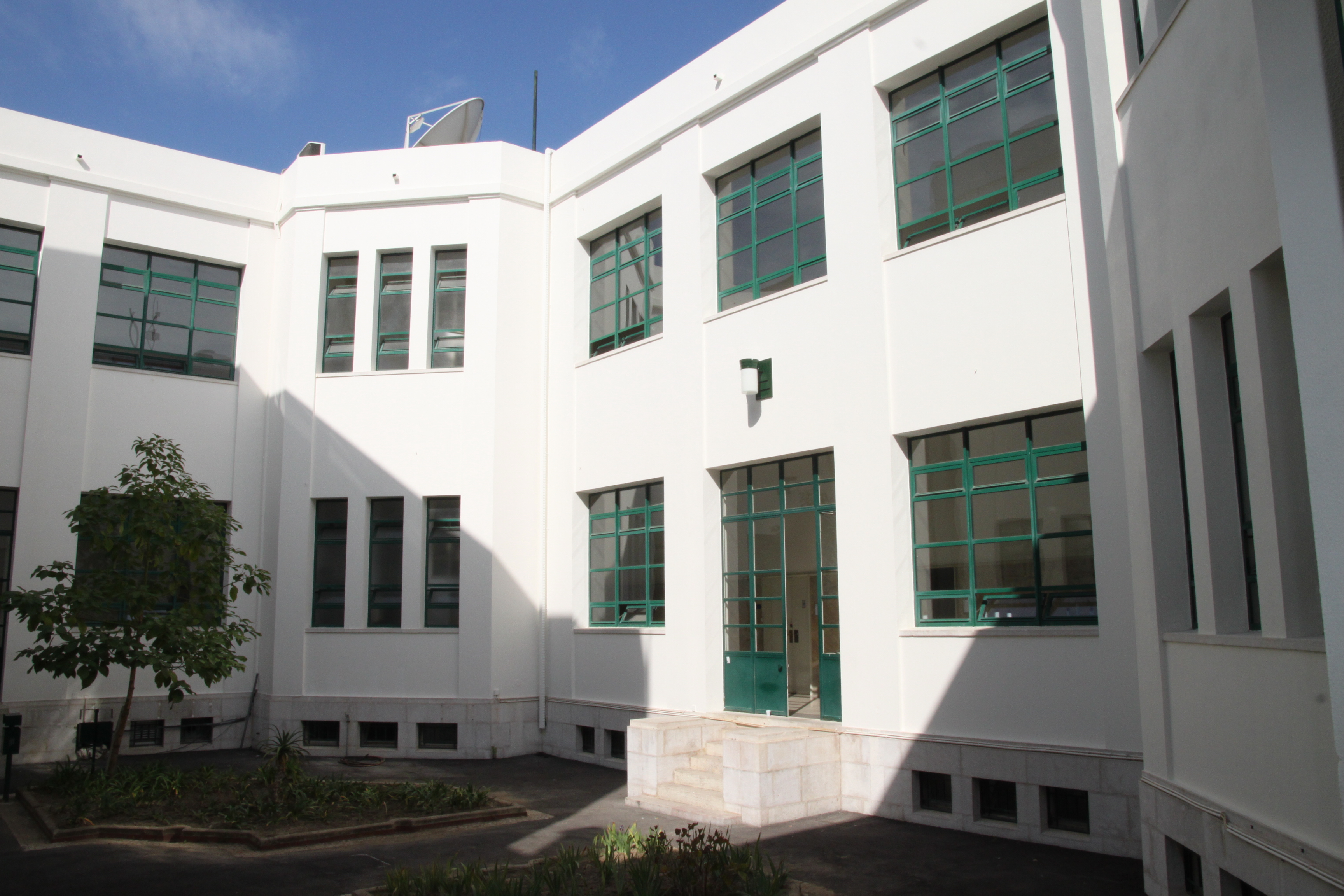 Instituto Superior Técnico This file was uploaded for Wiki Loves Monuments in Portugal with the unique identifier 97003162.